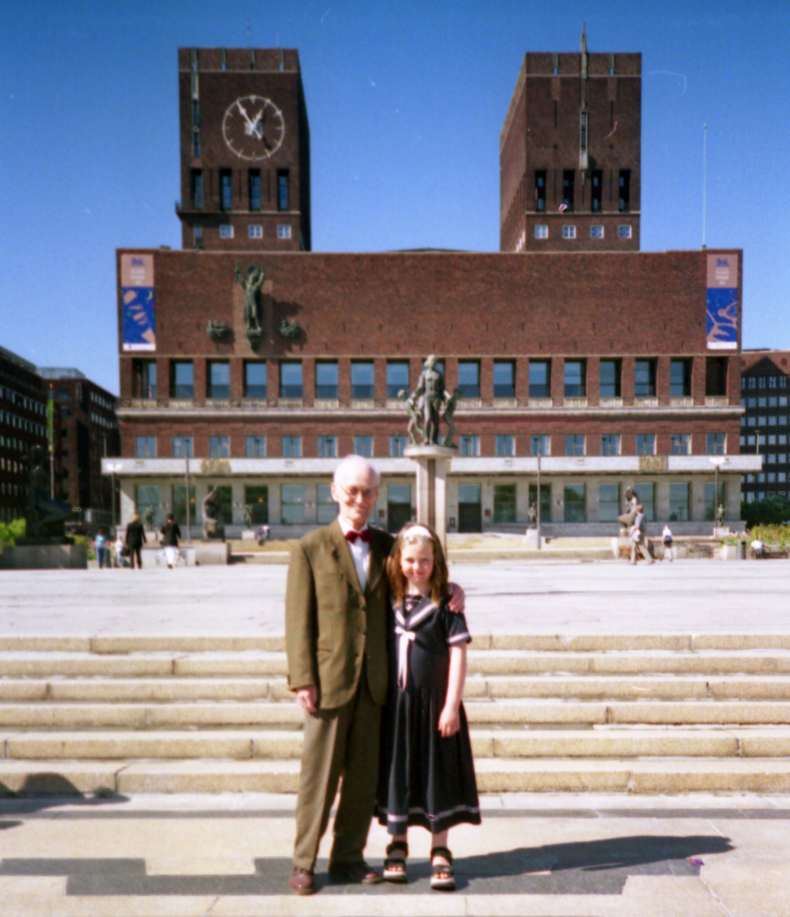 Elise Flåten Øygaren og Martin Gauslaa har begge lagt brev i Oslos tidskapsel. Oslo rådhus i bakgrunnen.